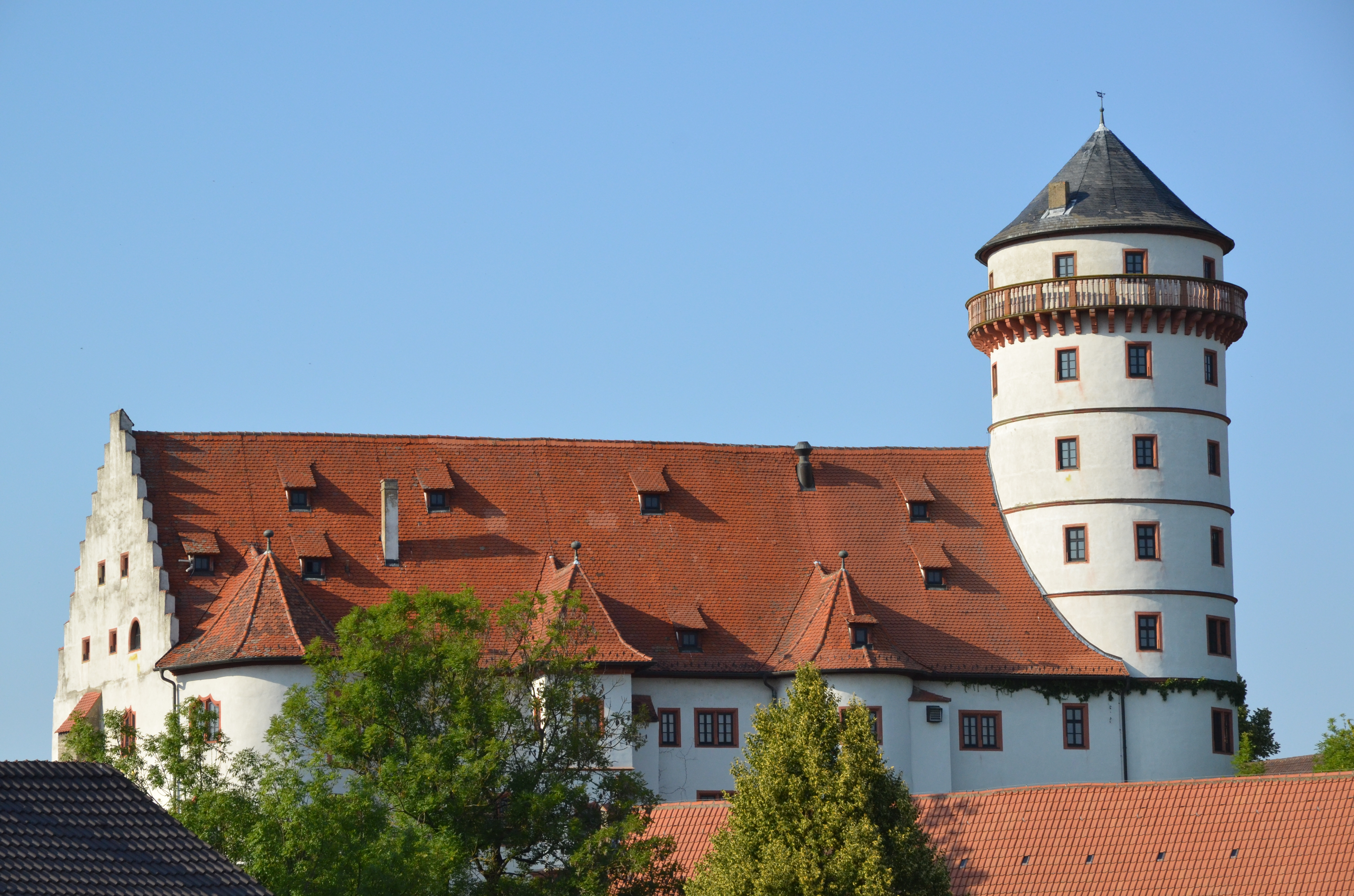 Grumbacher Schloss in Rimpar